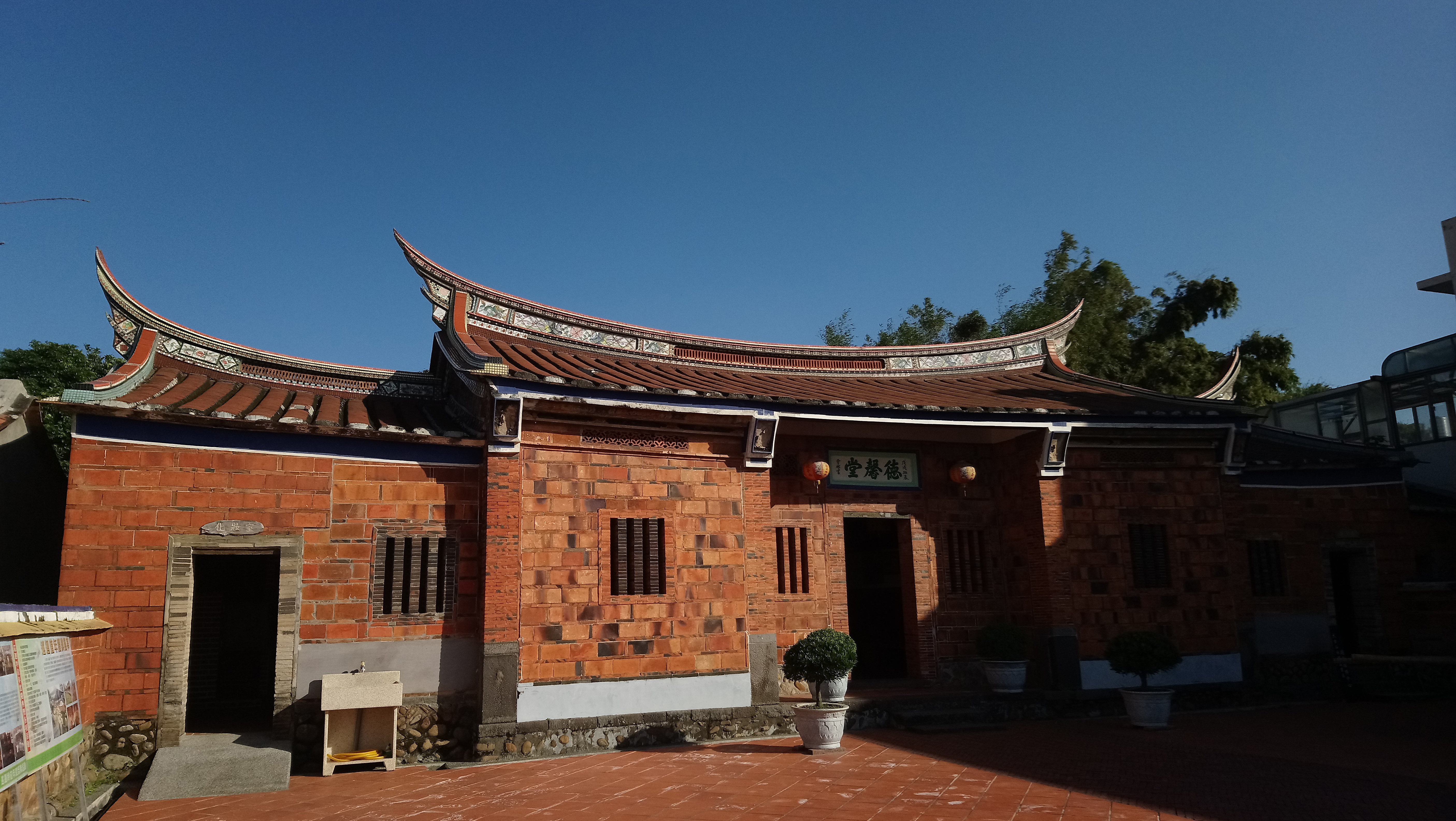 蘆竹德馨堂,桃園市蘆竹區南崁地區山鼻里